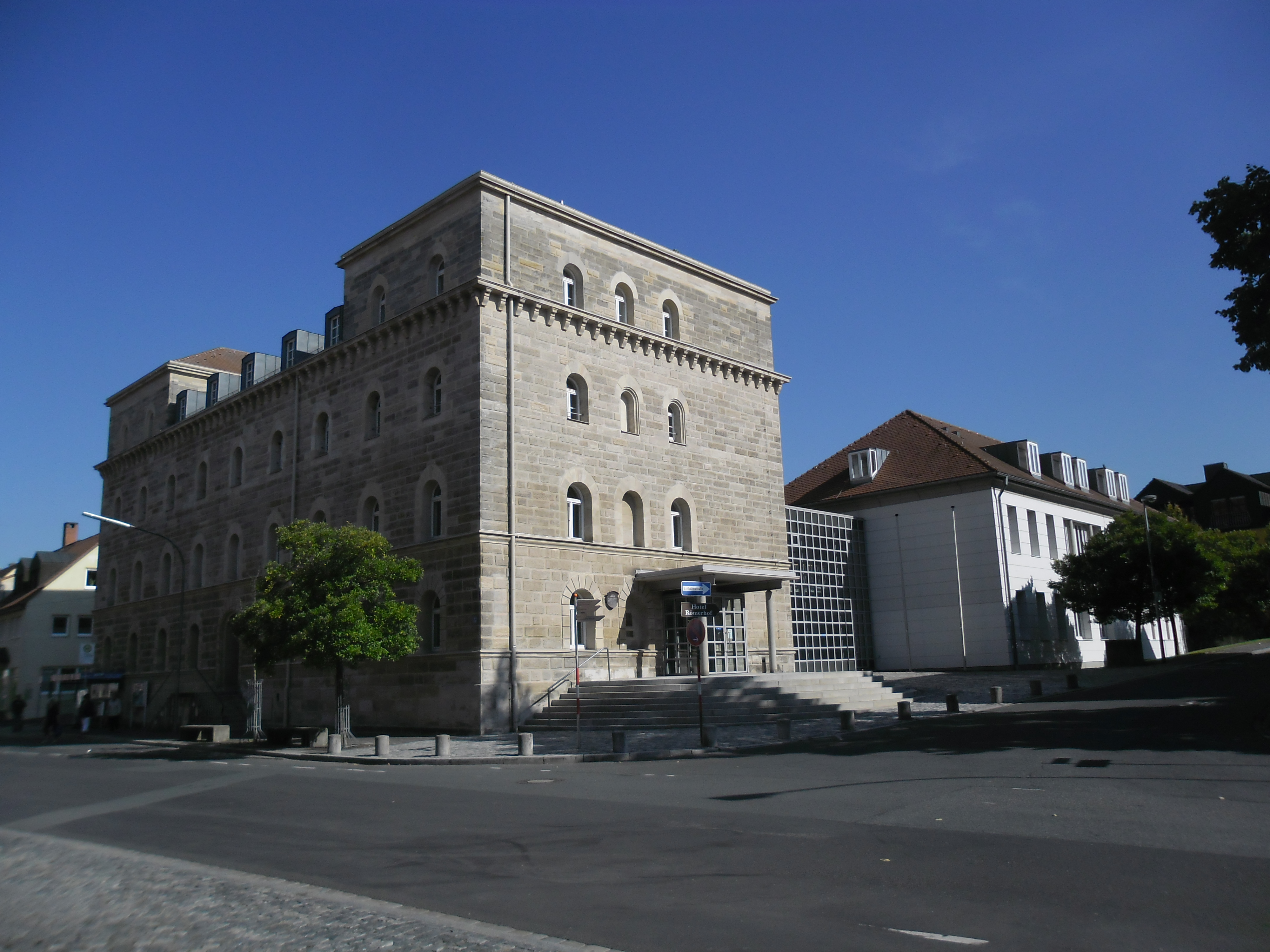 Blick von Westen auf das Gebäude des Neustädter Amtsgerichtes in der Bamberger Straße 28 nordöstlich des Hauptmarktes